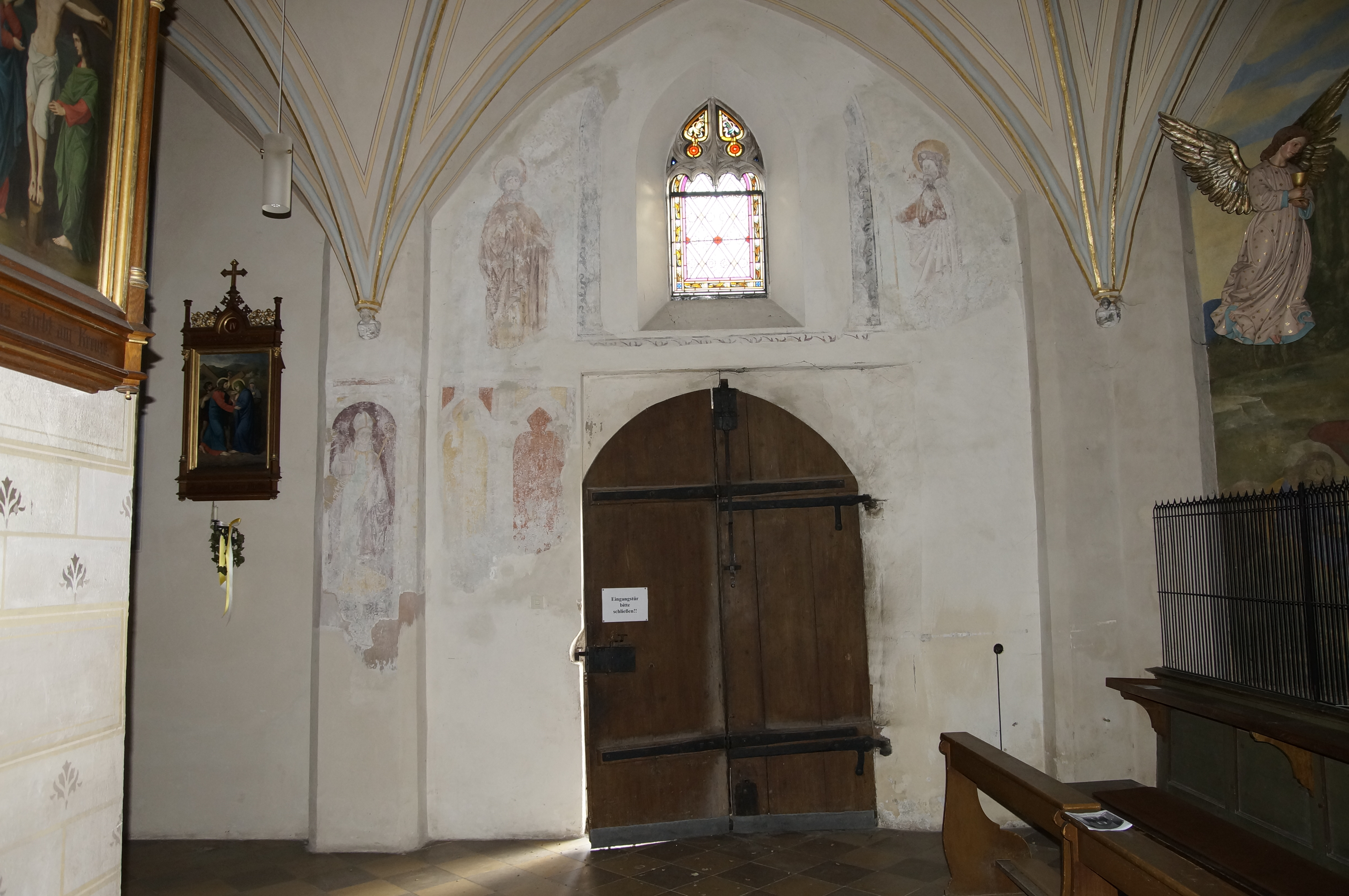 Wandbilder aus dem 15. Jahrhundert neben dem Hauptportal der Kirche St. Johannes in Moosburg an der Isar